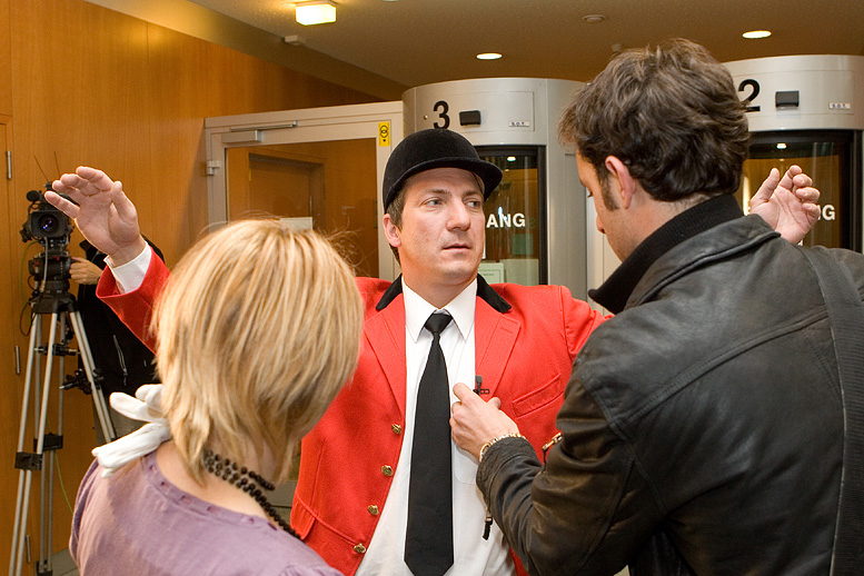 Dreharbeiten zu einer "echt-fett"-Folge